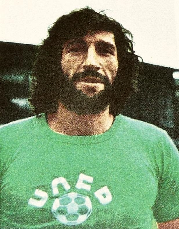 Yves Triantafilos en 1974, 'Ageducatifs Football 1974 - 1975', Panini figurina n°43.